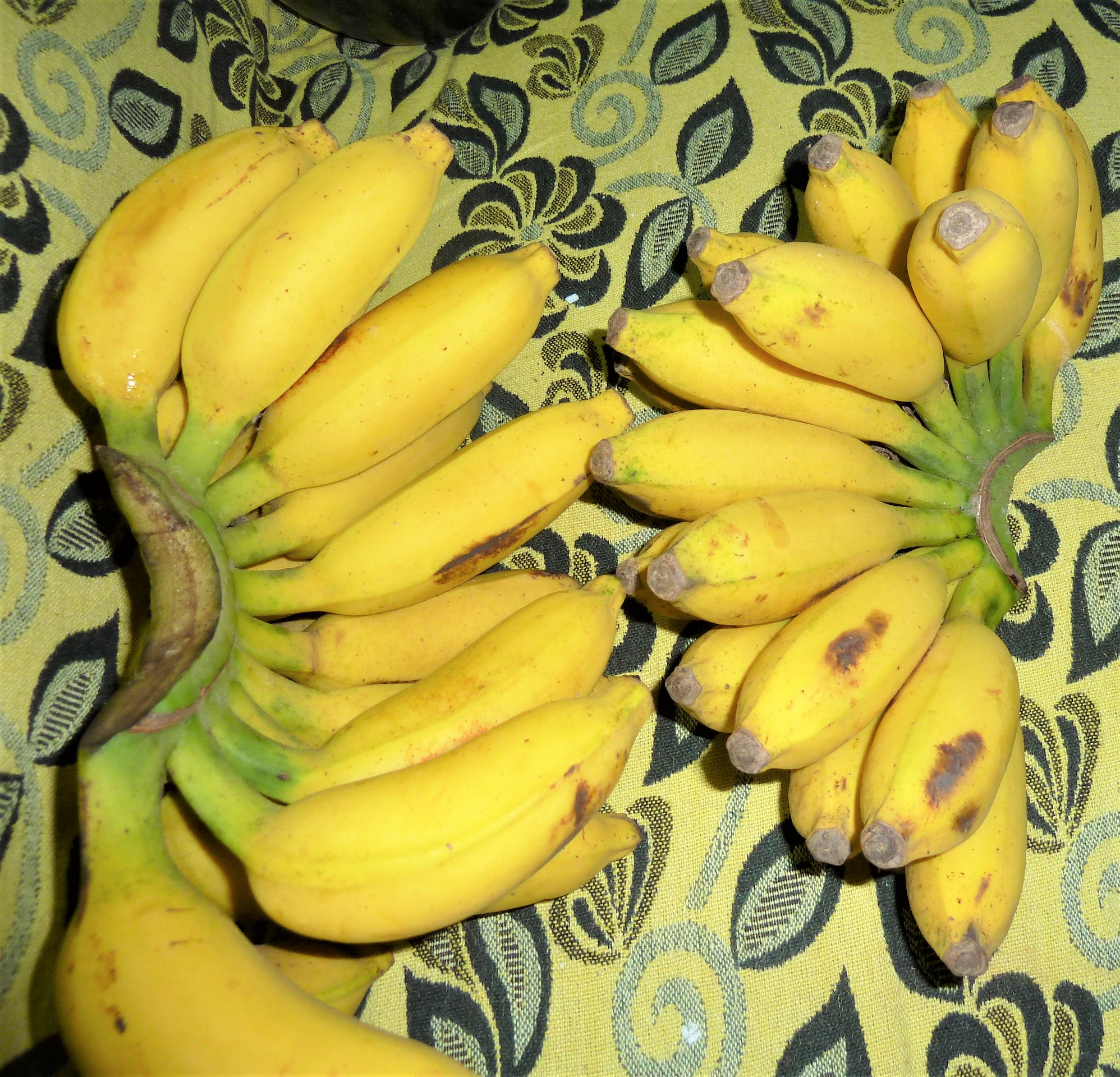 అరటి పండ్లు